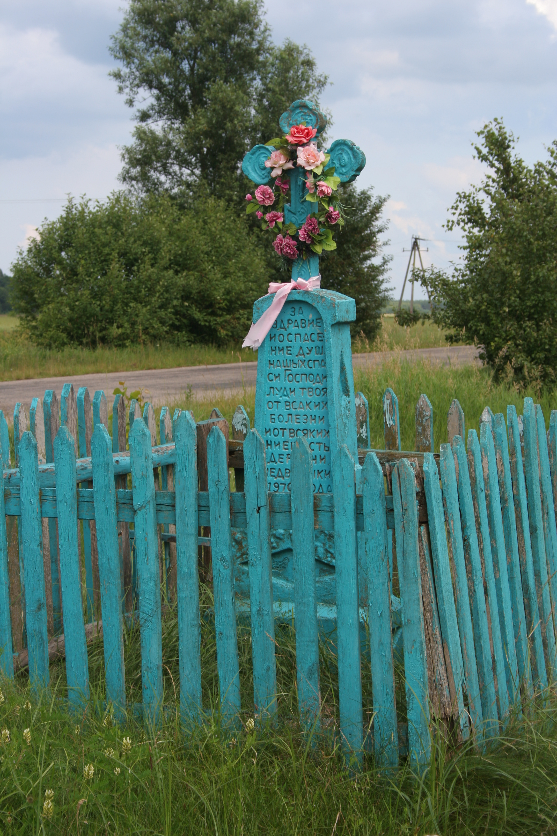 Krzyż przydrożny w Mikuliczach.